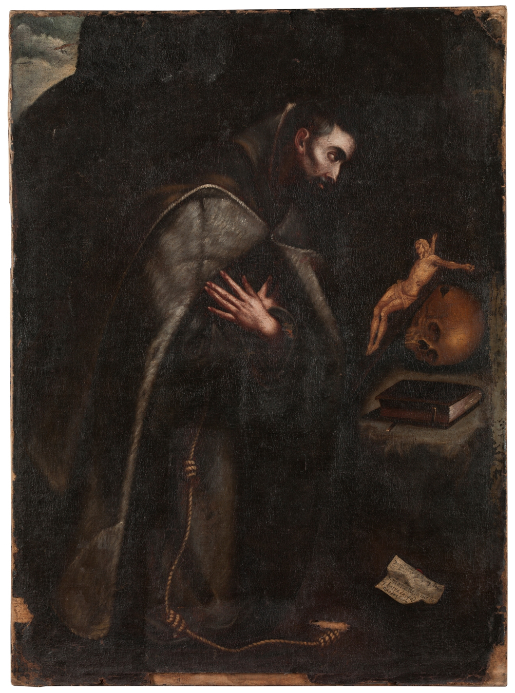 La obra representa a San Francisco de Asís, el fundador de la Orden de los franciscanos. El santo aparece arrodillado, con las manos cruzadas sobre el pecho, y dirigiendo su mirada hacia un crucifijo. Junto a este, y sobre el saliente de una roca, aparecen un libro y una calavera, con lo que se crea un contexto meditativo. El santo resulta identificable por su hábito pardo y por el largo cordón que ciñe su cintura y cae hasta el suelo. La escena se desarrolla en un abrigo rocoso, y en la parte superior izquierda es posible ver un fragmento de celaje.